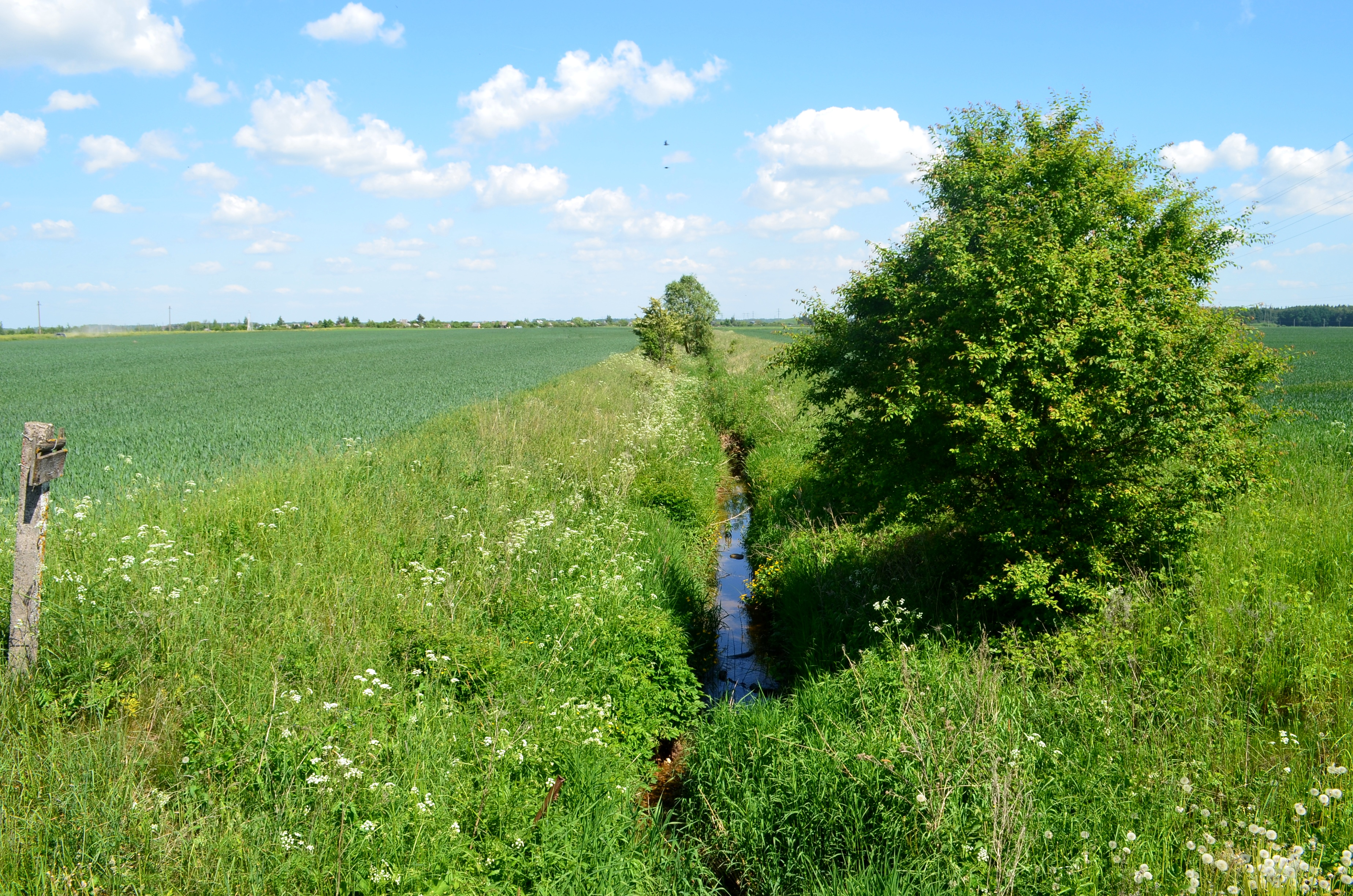 Audruvė šalia Joniškio, Joniškio raj.